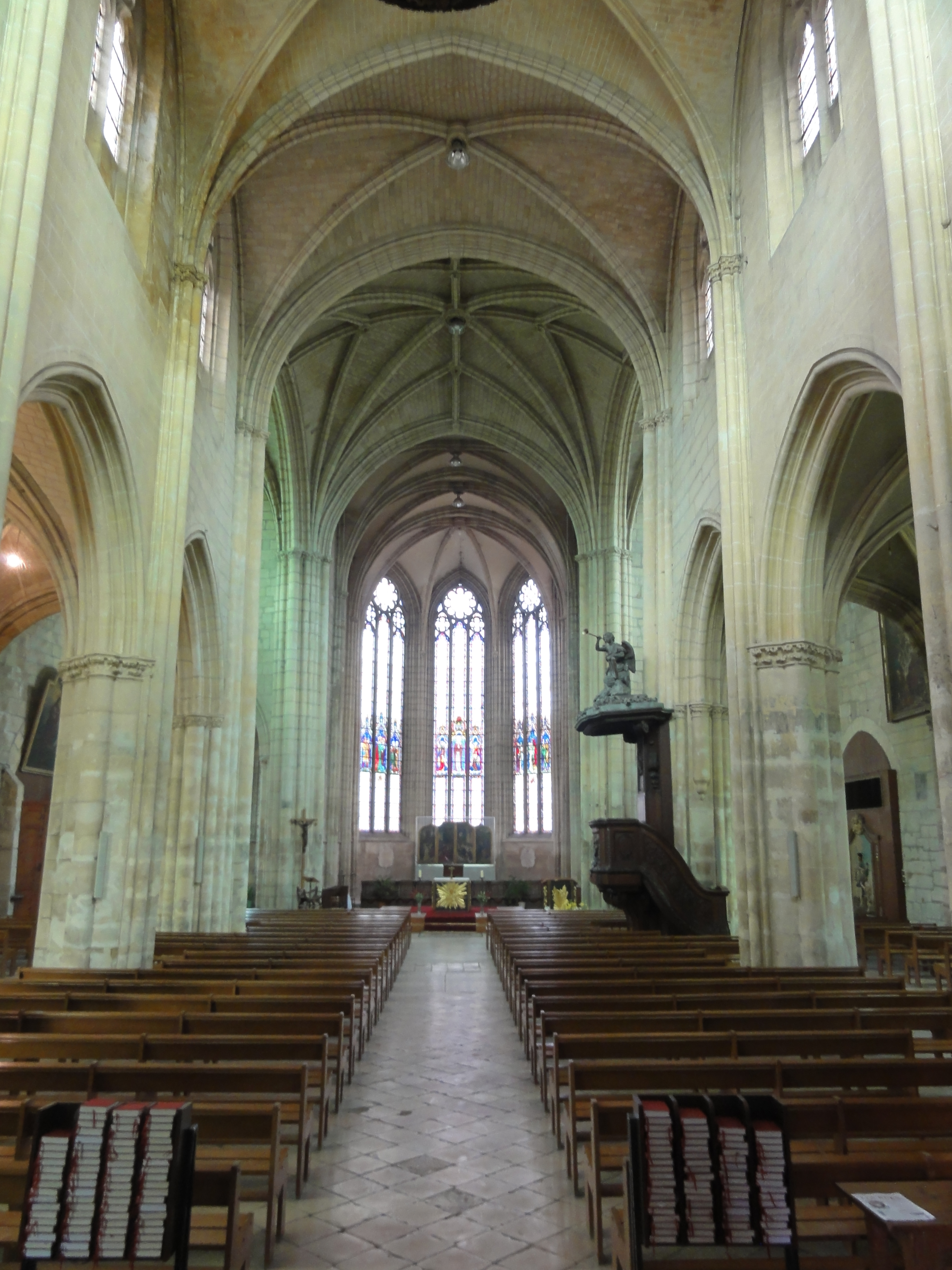 Église Notre-Dame de Chambly, intérieur nef